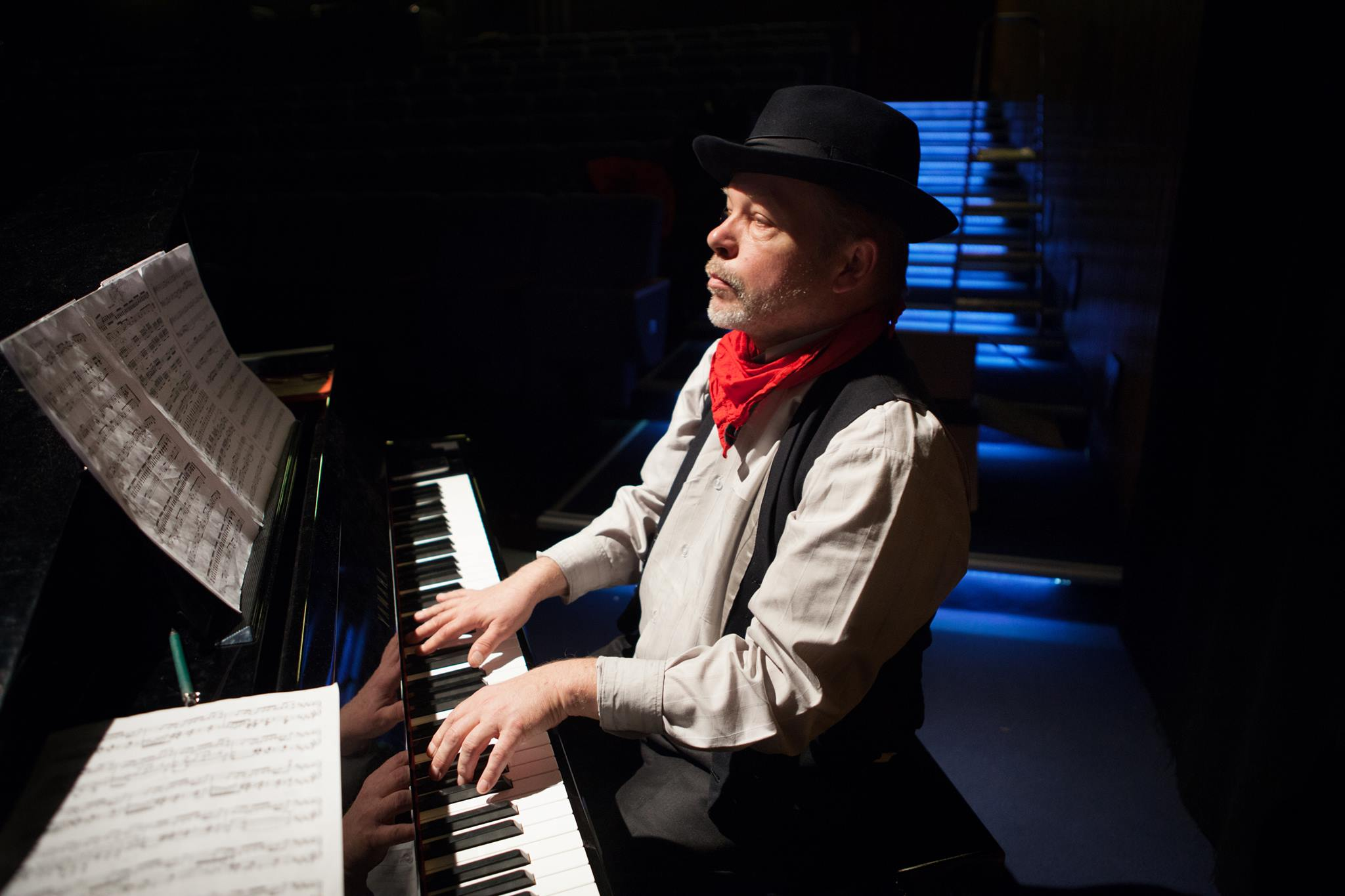 Pianisti Arto Piispanen Tanssiteatteri MD:n Hyppy/The Leap-esityksessä marraskuussa 2014